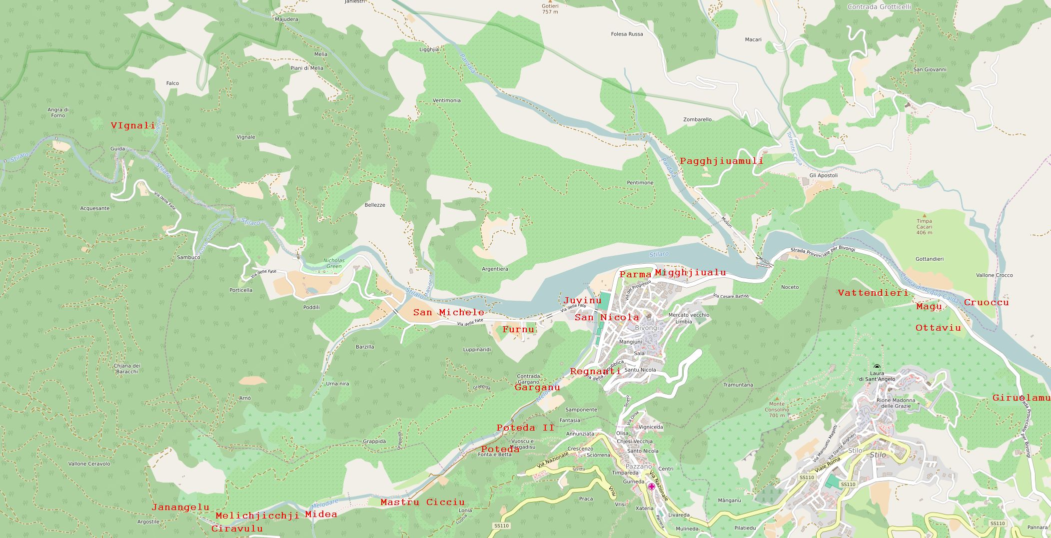 Carta Open Street Map (11-settembre 2016) dei mulini di Bivongi